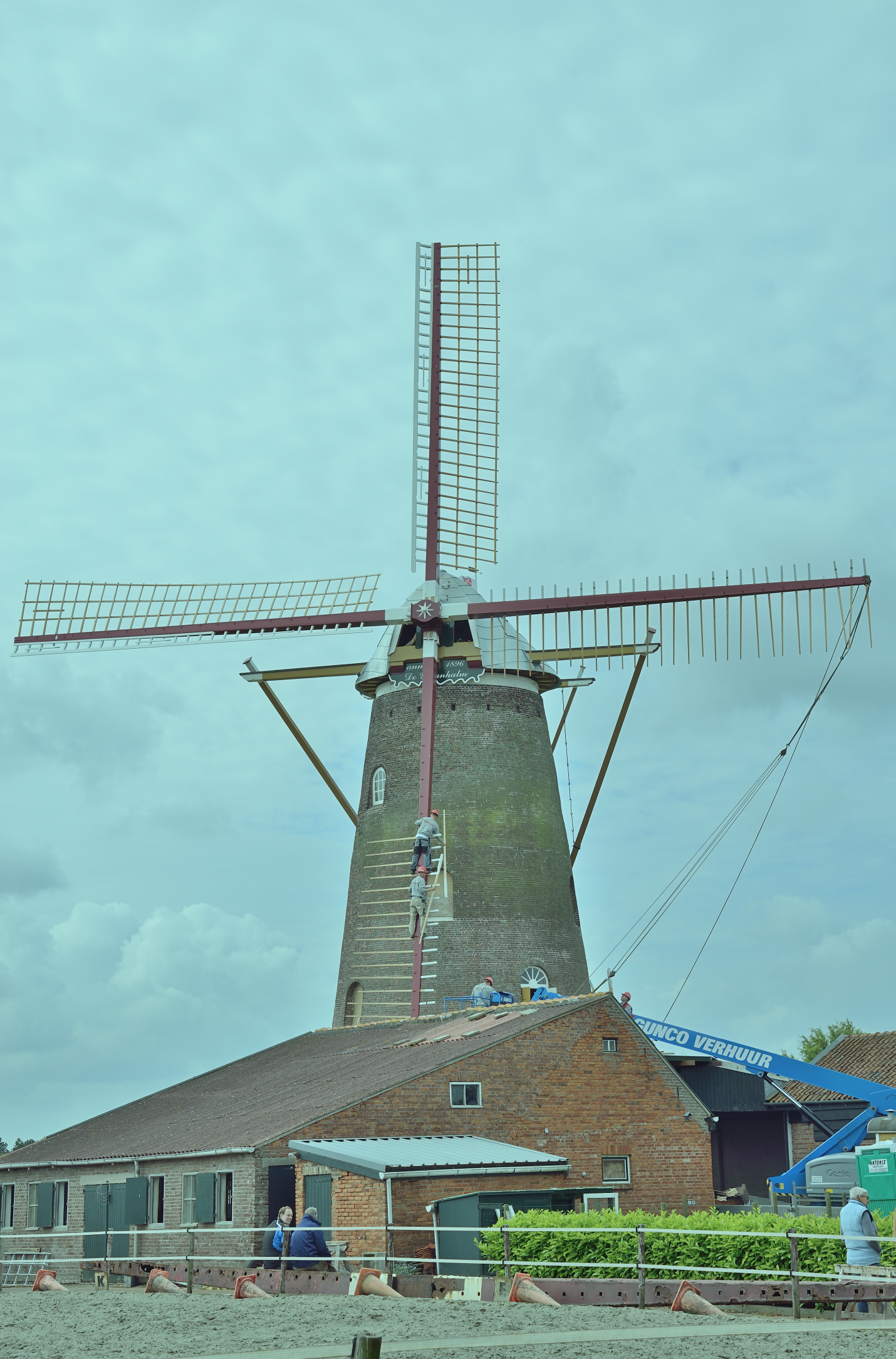 De Graanhalm, roesteken